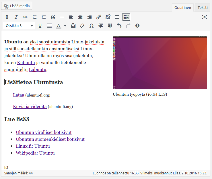 WordPress-sivuston muokkausnäkymä. Käytössä versio 4.6.1.